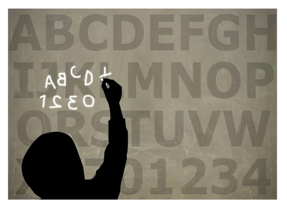 dislexia nens